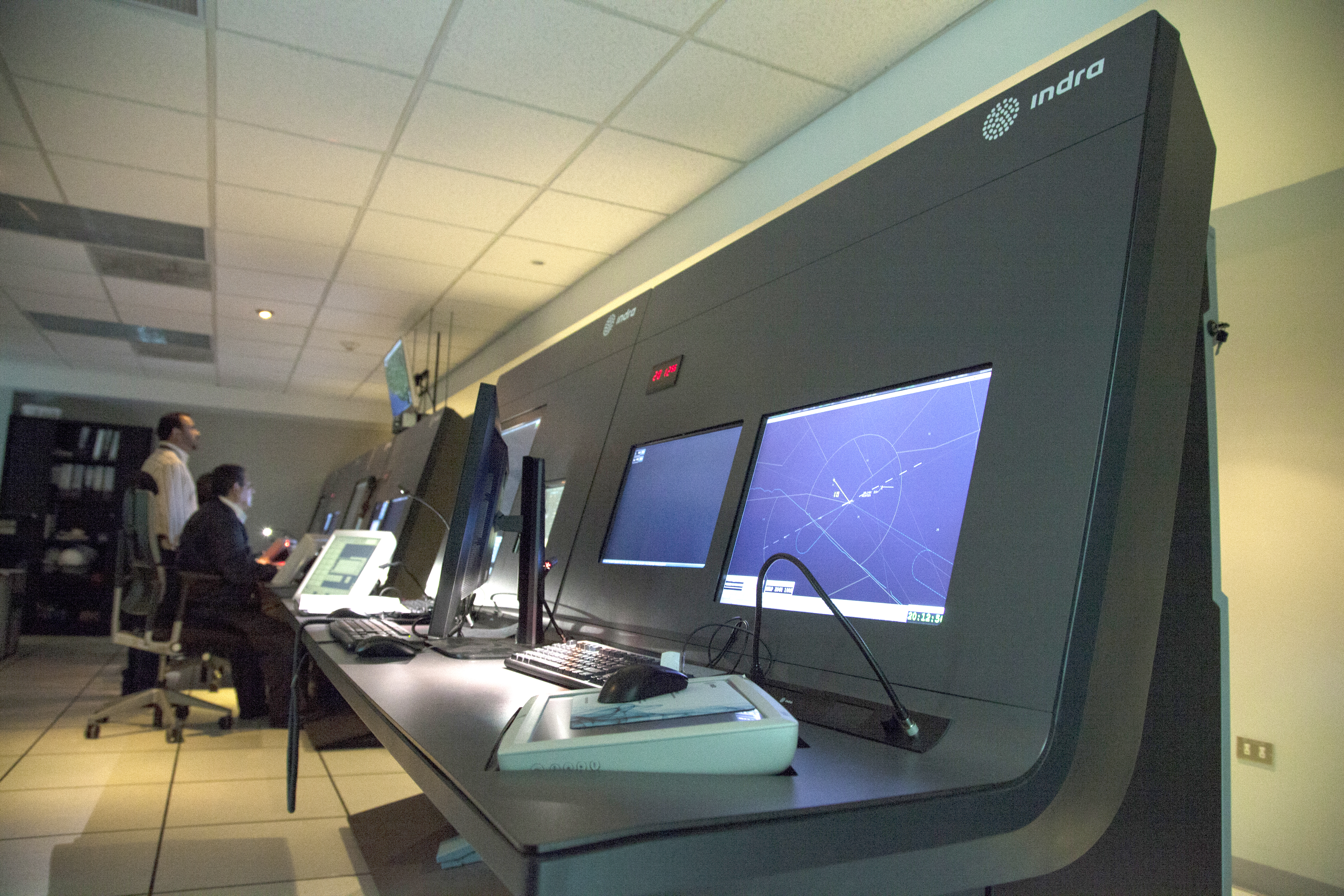 CEPA, Aeropuerto de El Salvador, Nelson Vanegas